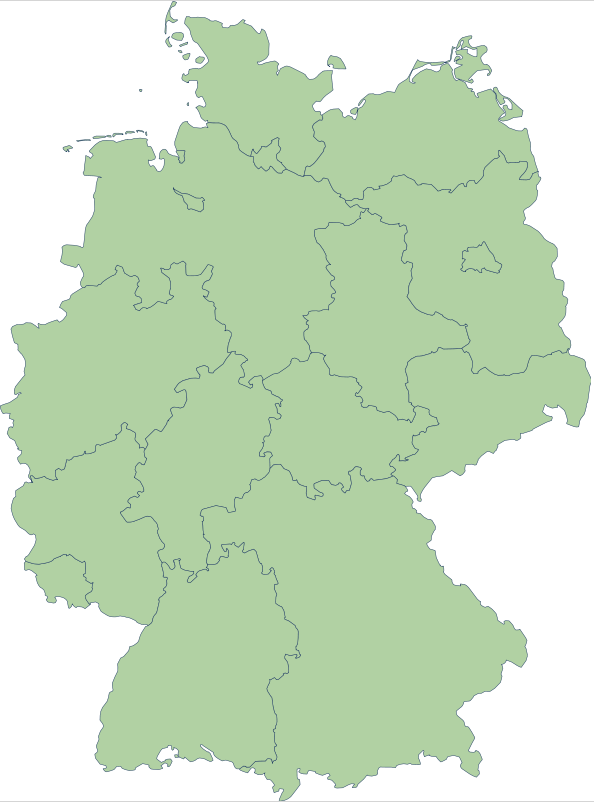 German Bundesländer